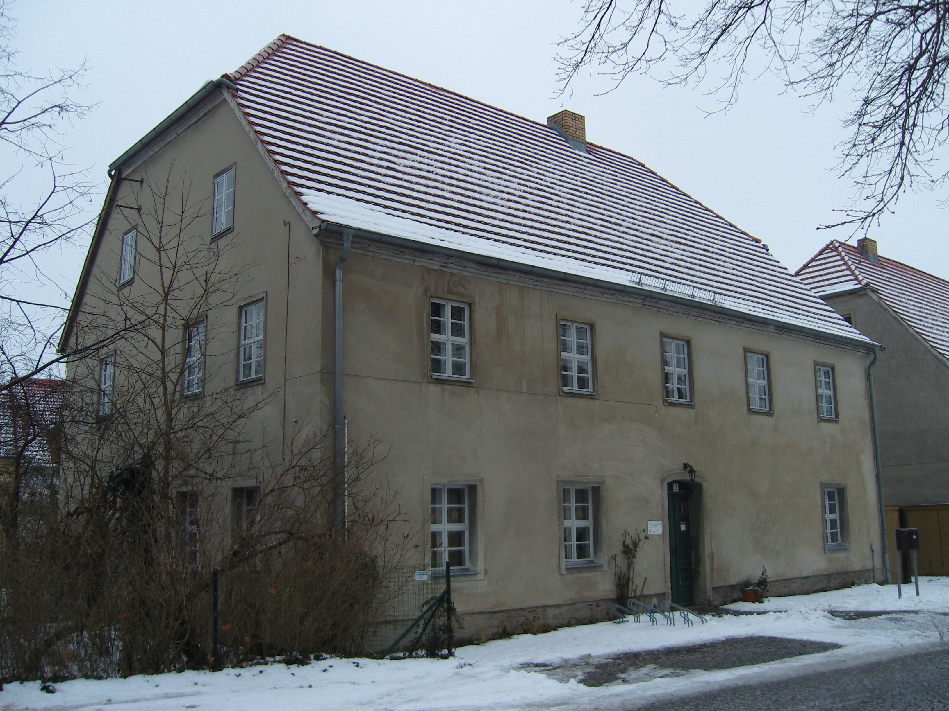 Pfarrhaus in Ruhland, Kirchplatz 2 (Baudenkmal)